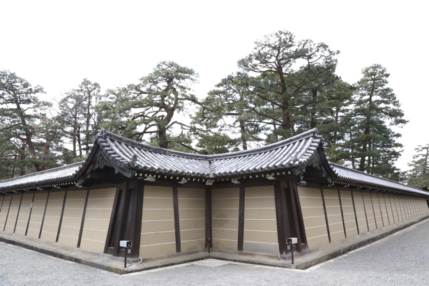 京都御苑 京都御所 猿が辻